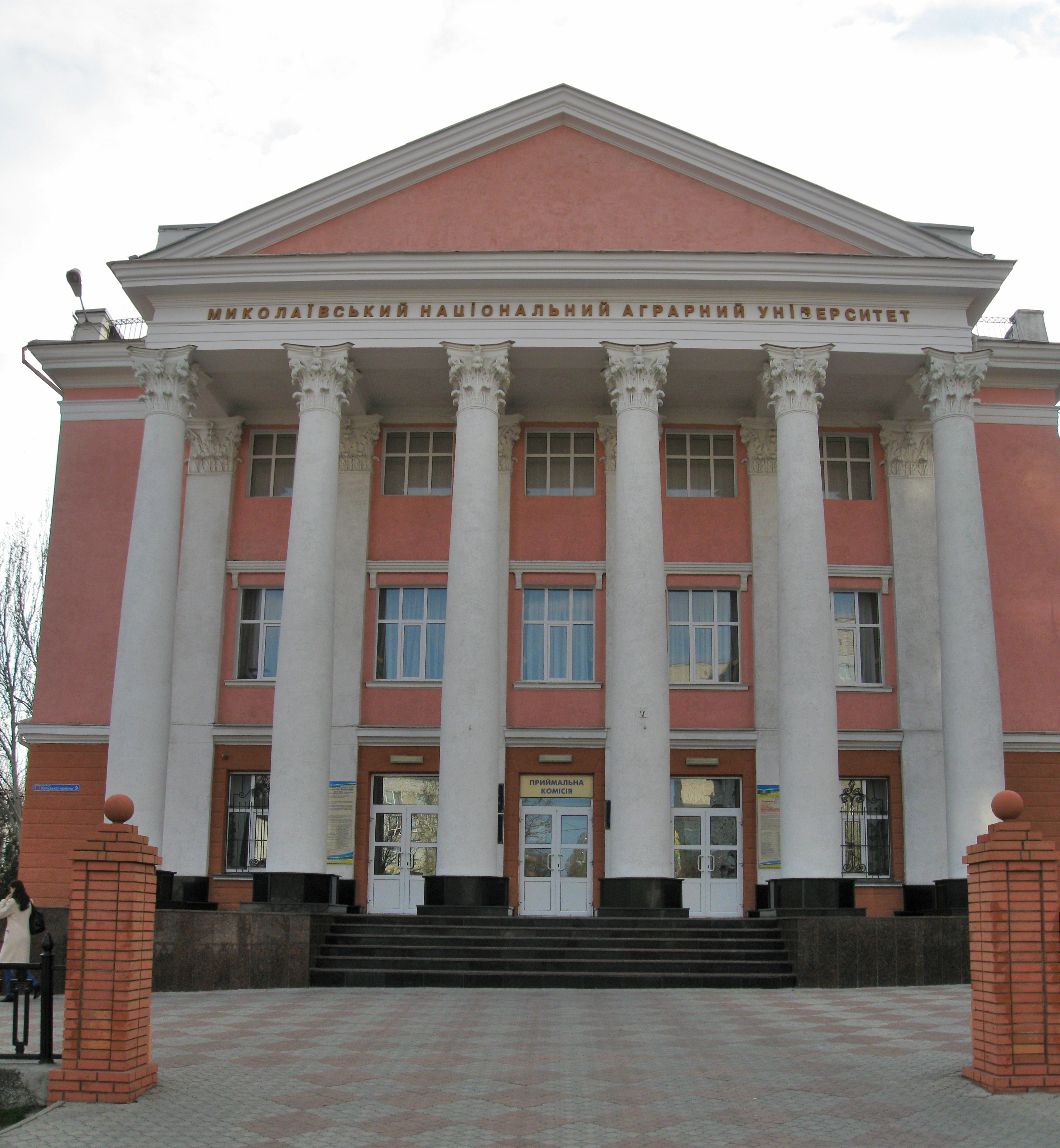 Головний корпус Миколаївського аграрного університету